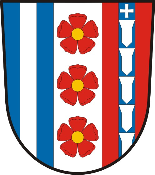 Libějovice